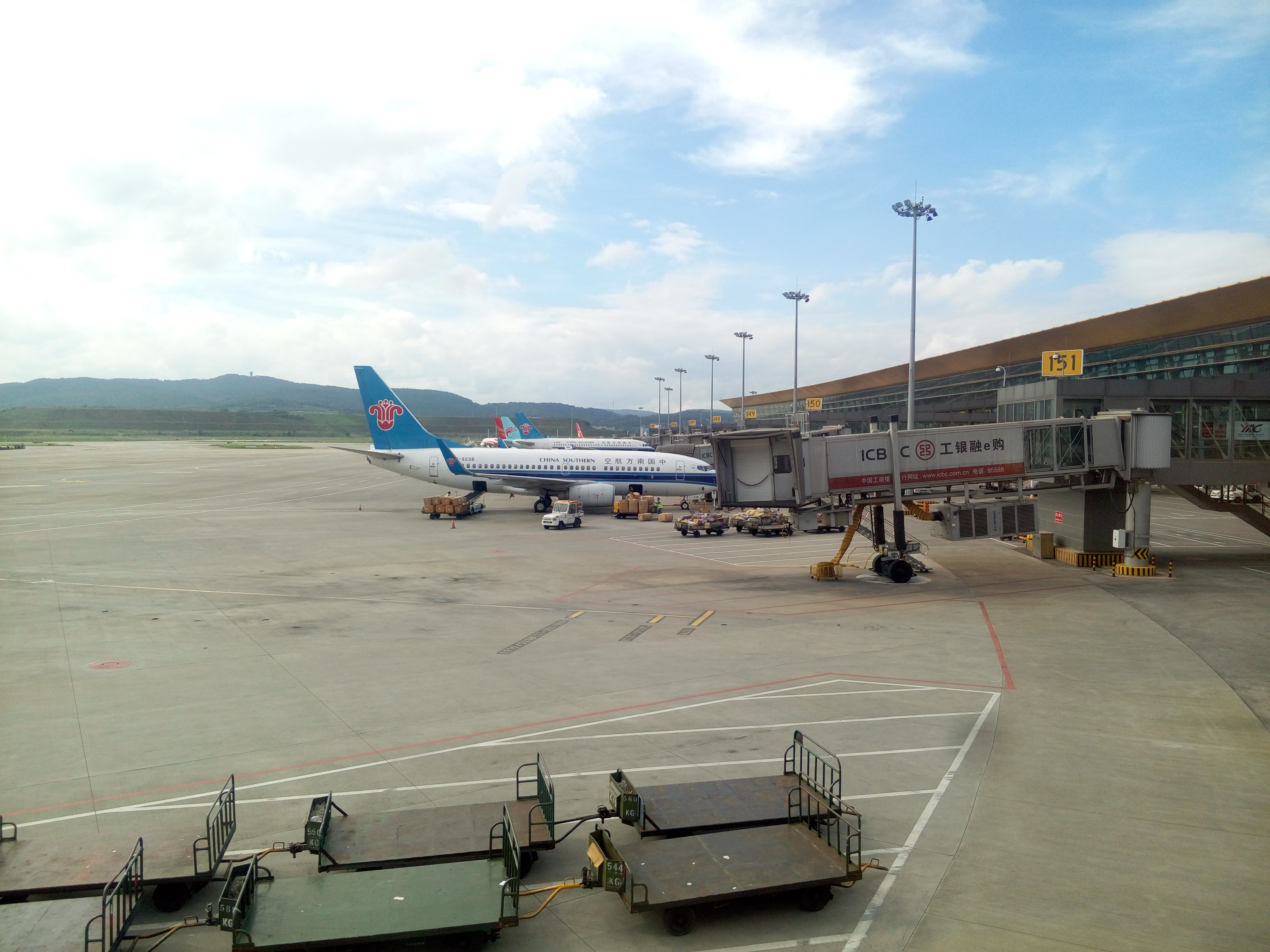 中文（中国大陆）: 昆明长水国际机场停机坪